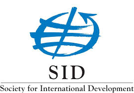 סיד העולמי